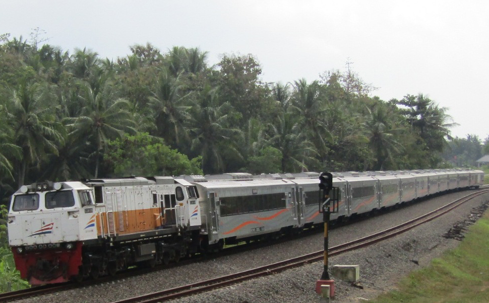 KA Argo Wilis stainless steel.